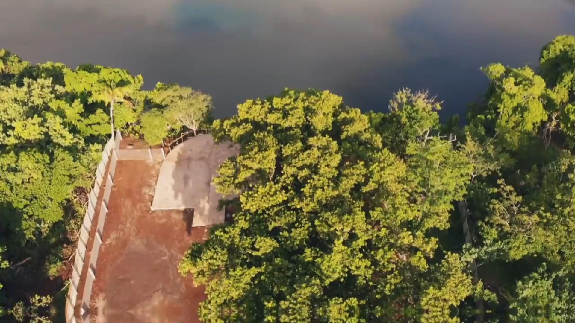 Image prise par un drone du belvédère du lac Lalolalo à Wallis (Wallis-et-Futuna), construit en août 2018.